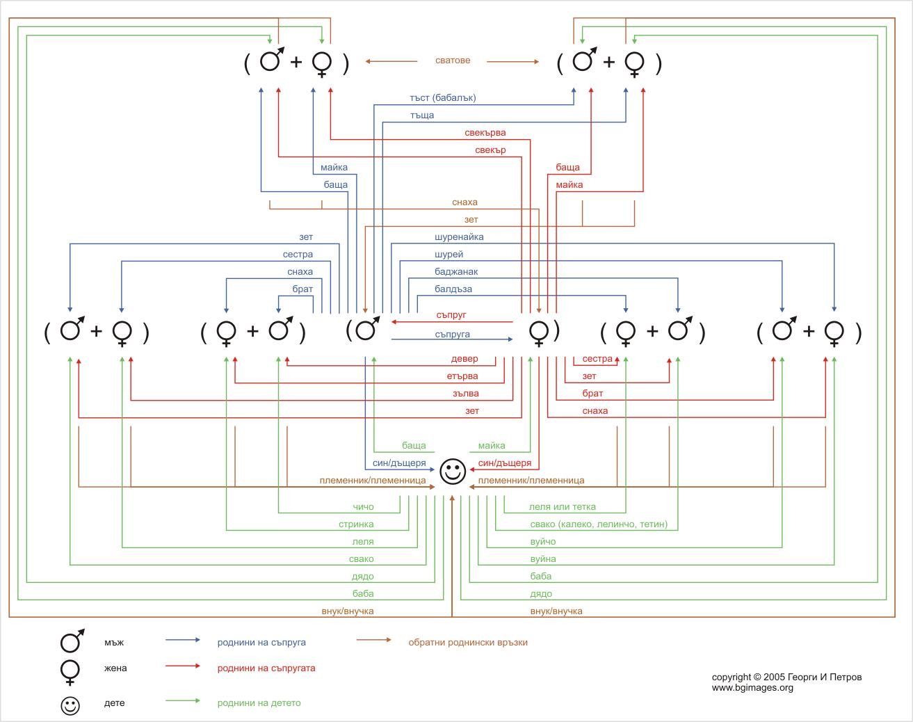 Названия на роднинските взаимоотношения. Автор: Георги Петров (Gpetrov) от: Българския Фото Албум